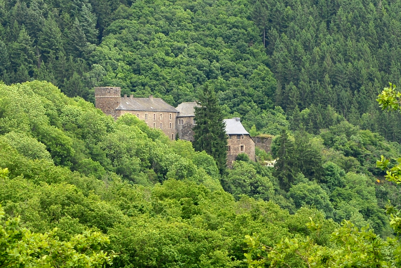 D'Schüttbuerg am Juni 2013 vun Alschent gesinn.